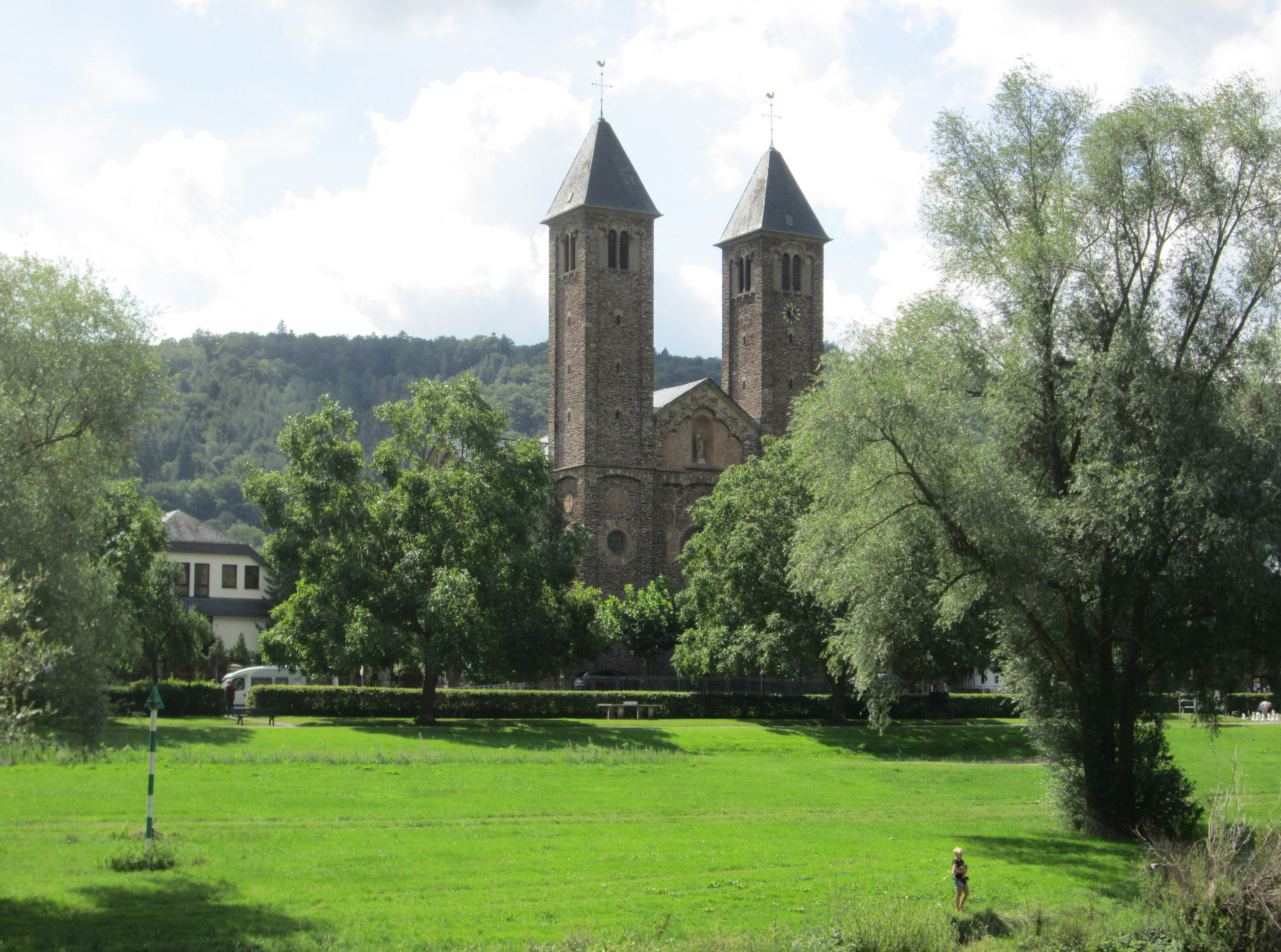 St. Salvator in Ernst, erbaut 1848